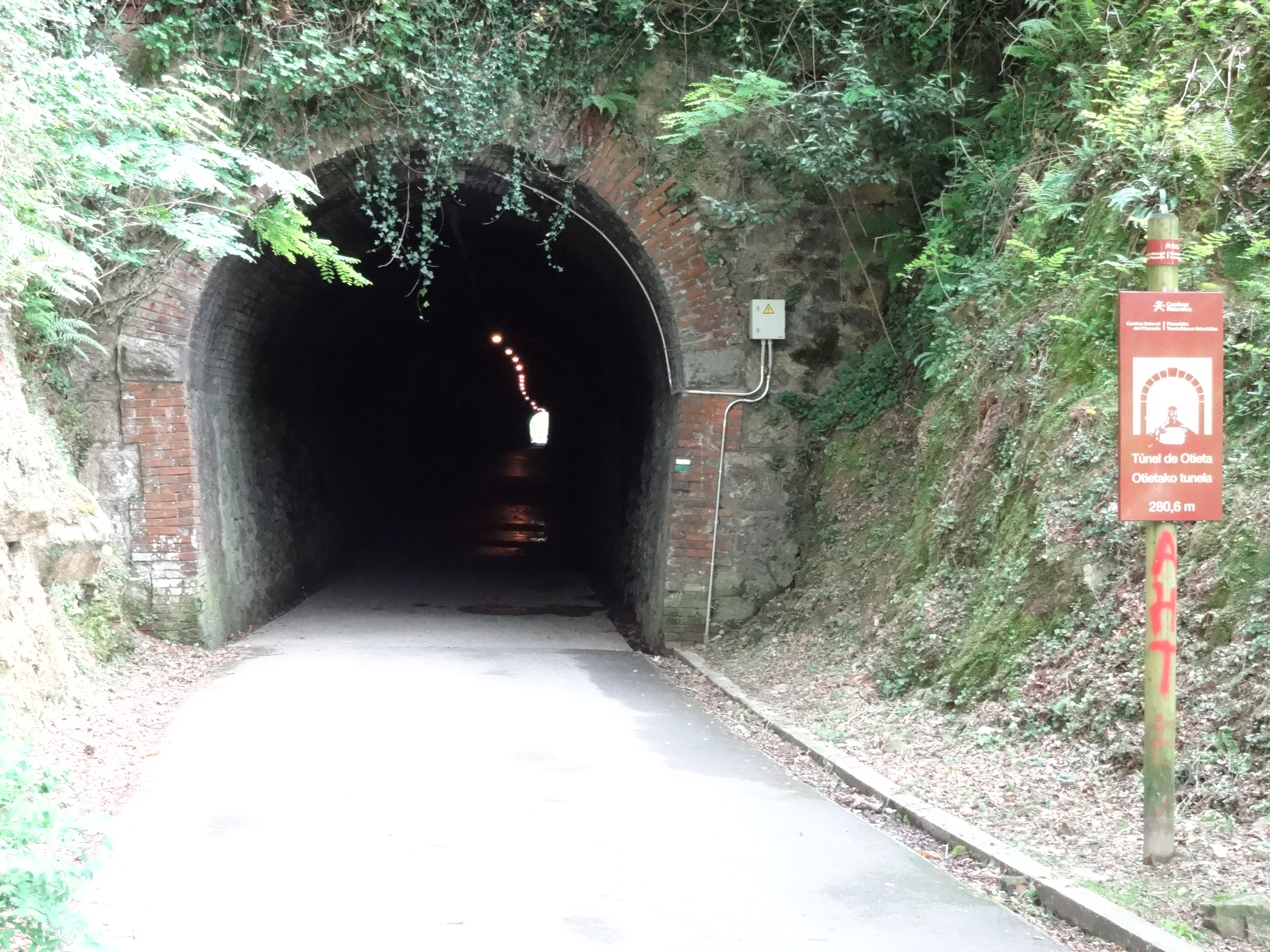 A la Vía Verde del Plazaola